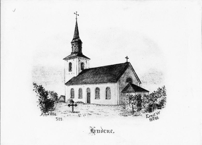 Kyrkan från sydöst. Tryck av teckning av Ernst Wennerblad, 1888. Kategori: (01) ExteriörerKyrkan från sydöst. Tryck av teckning av Ernst Wennerblad, 1888.